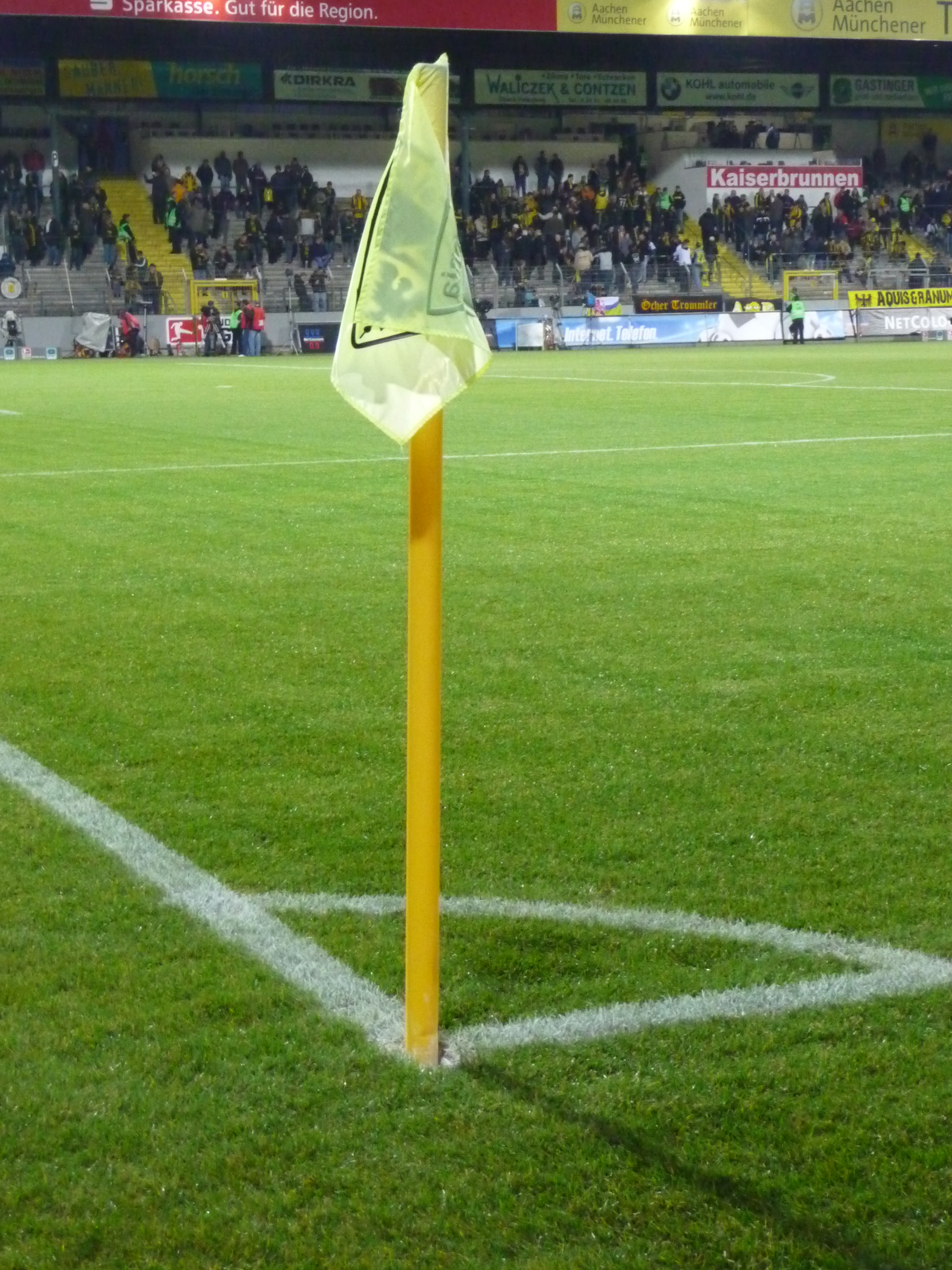 Eckfahne am Tivoli in Aachen